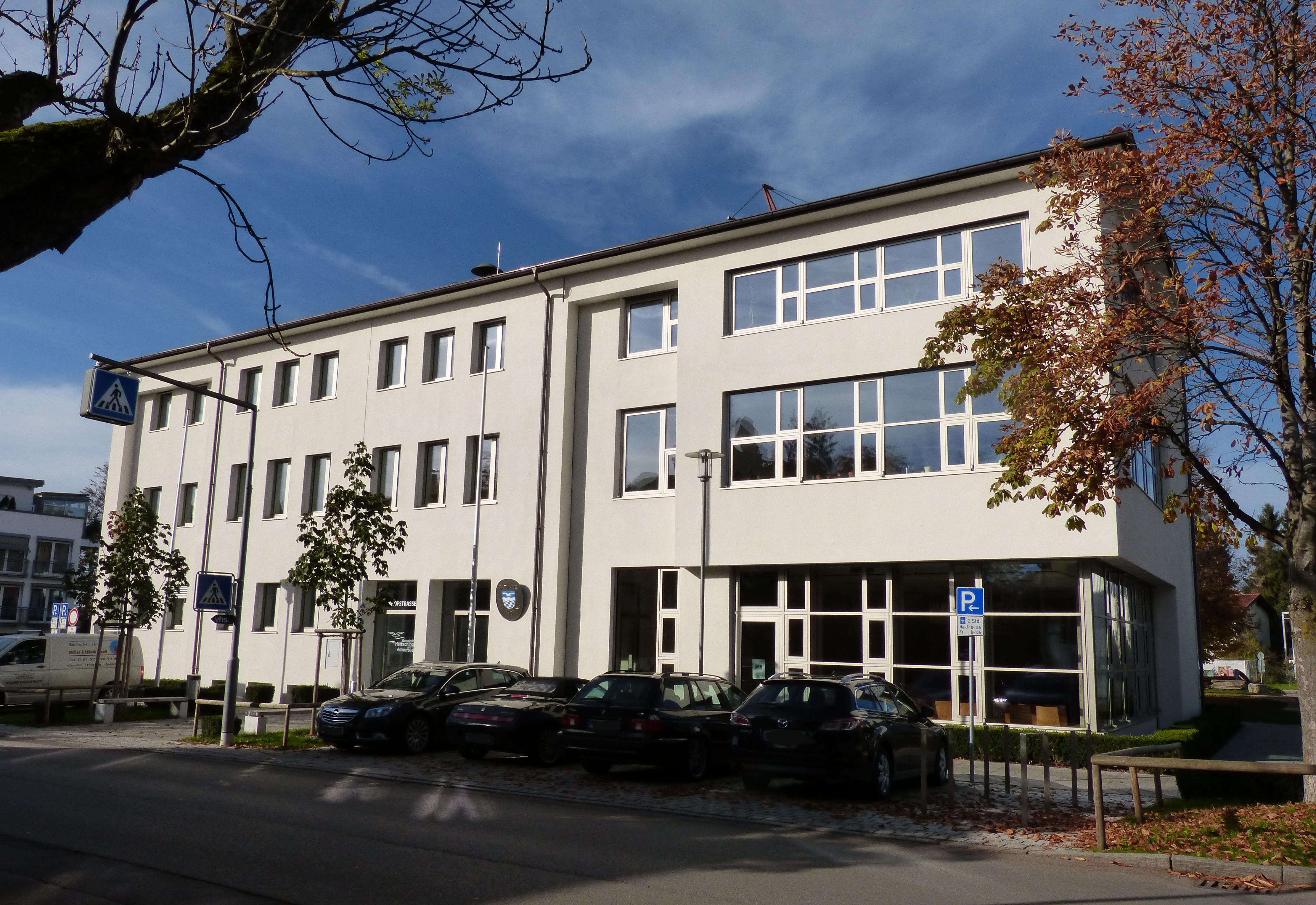 Herrsching, Bahnhofstraße 12. Das Rathaus der Gemeinde Herrsching am Ammersee.